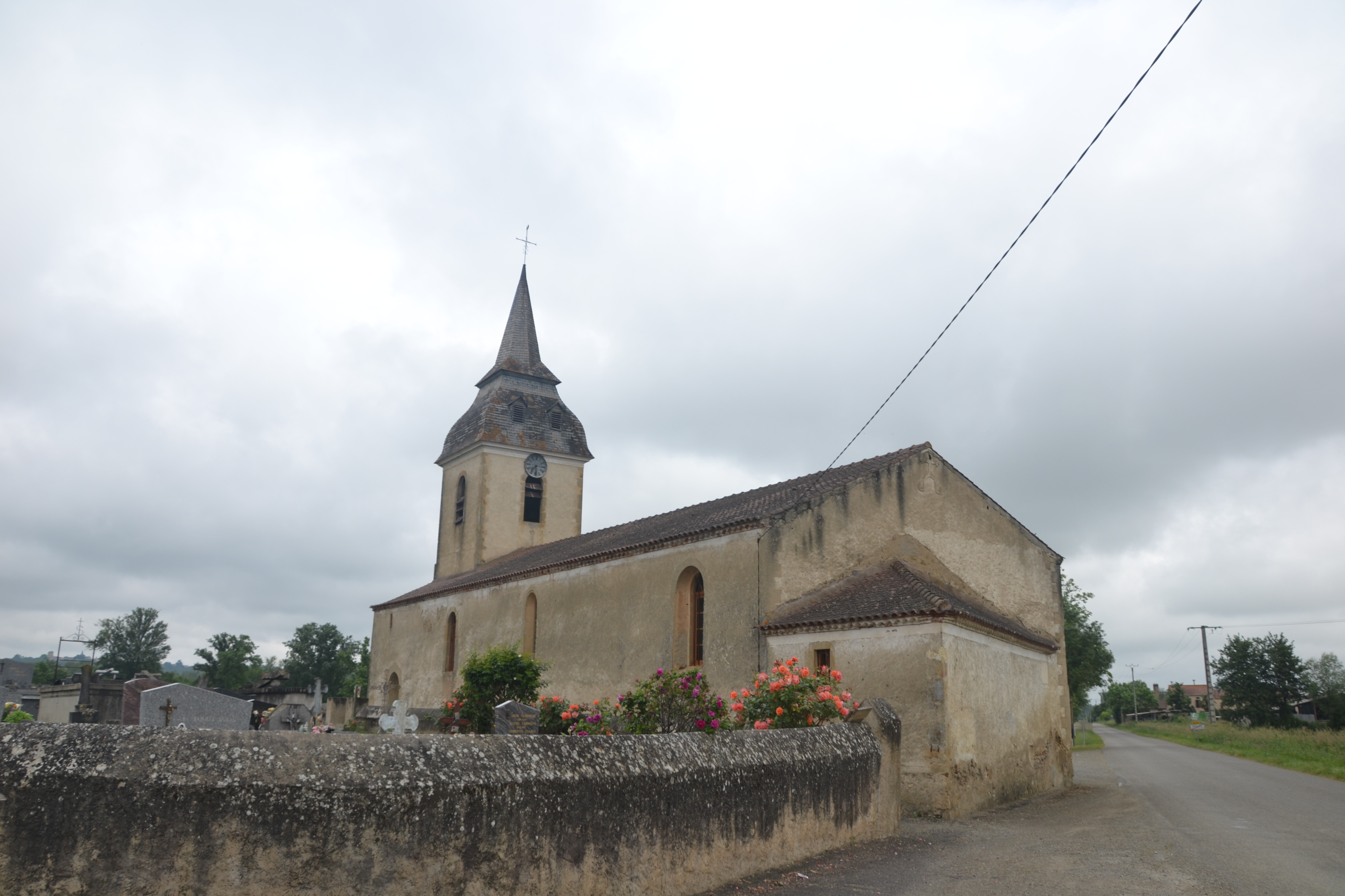 église Saint-Nicolas de Belloc